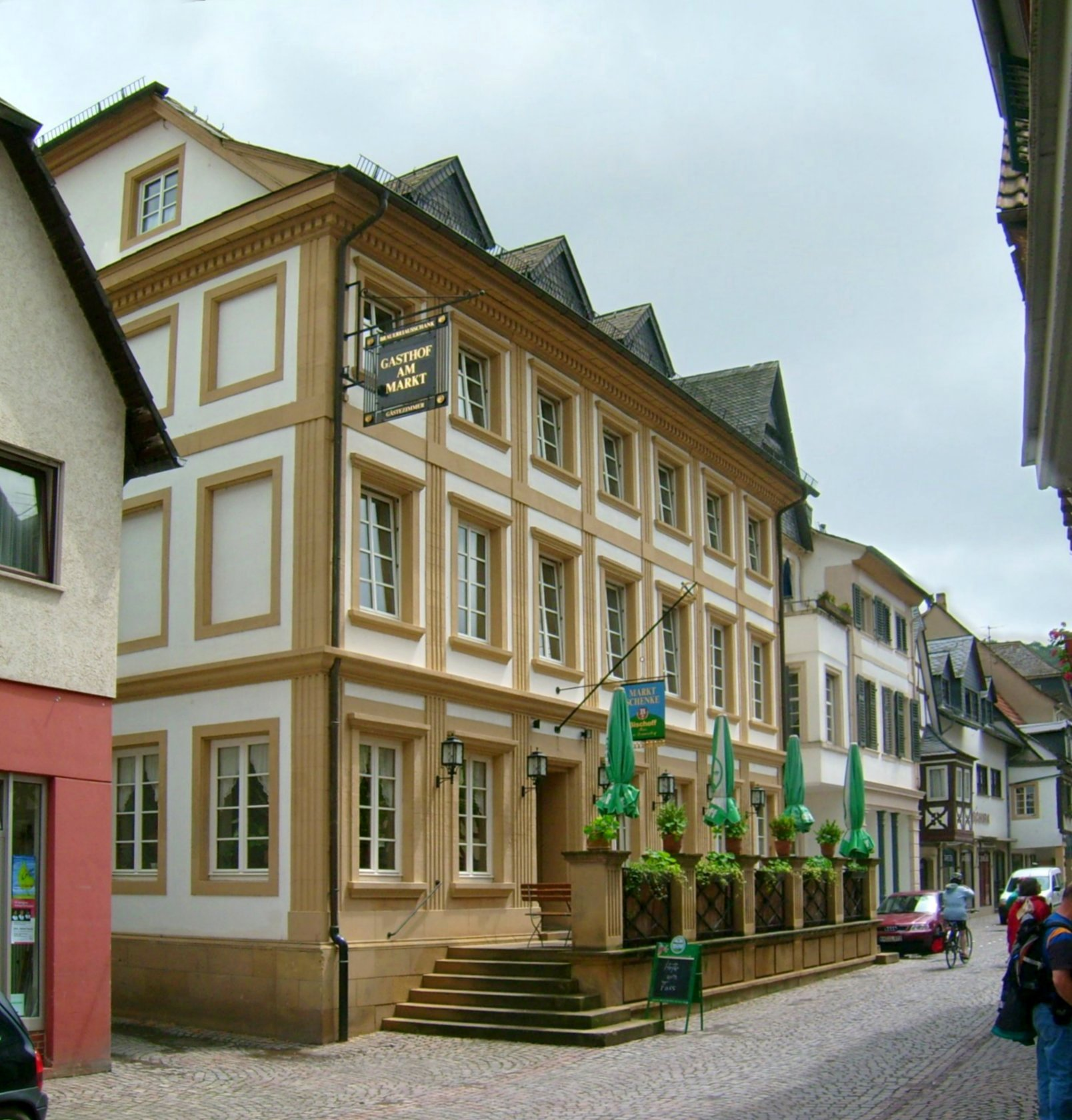 Gasthof am Markt; Meisenheim, Untergasse 40: dreigeschossiges klassizistisches Wohnhaus, 1822/23